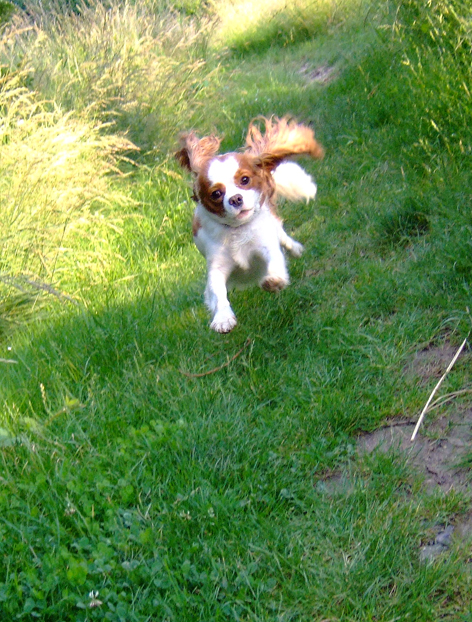 Cavalier King Charles Agility